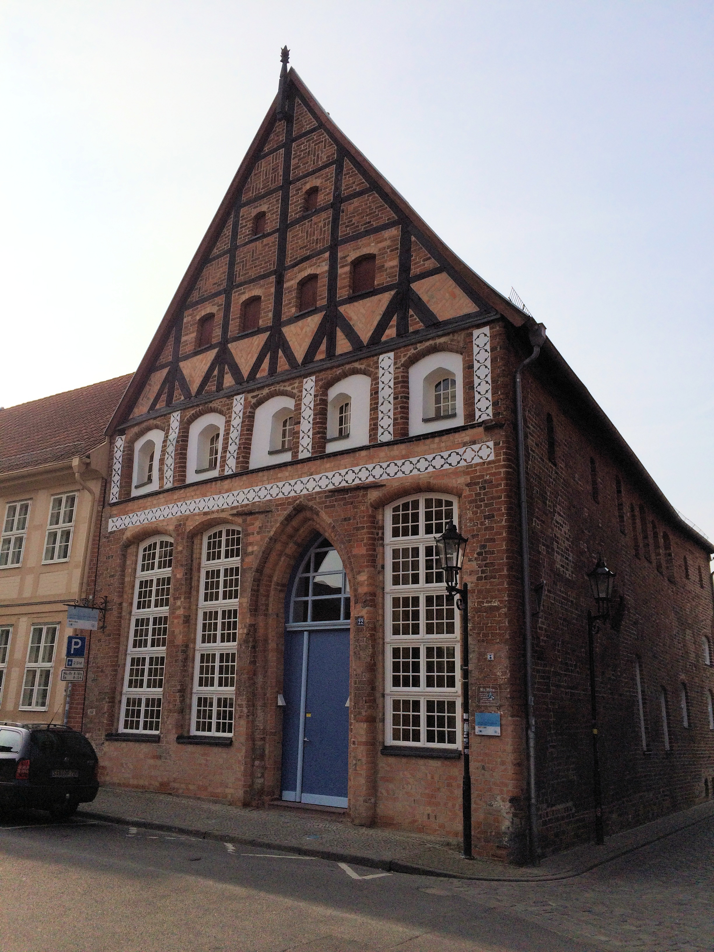 Die Alte Münze war die Münzeprägeanstalt der Stadt. Der spätgotische Backsteinbau entstand in der ersten Hälfte des 14. Jahrhunderts und wird im 21. Jahrhundert als Geschäftsstelle der Industrie- und Handelskammer Magdeburg genutzt.